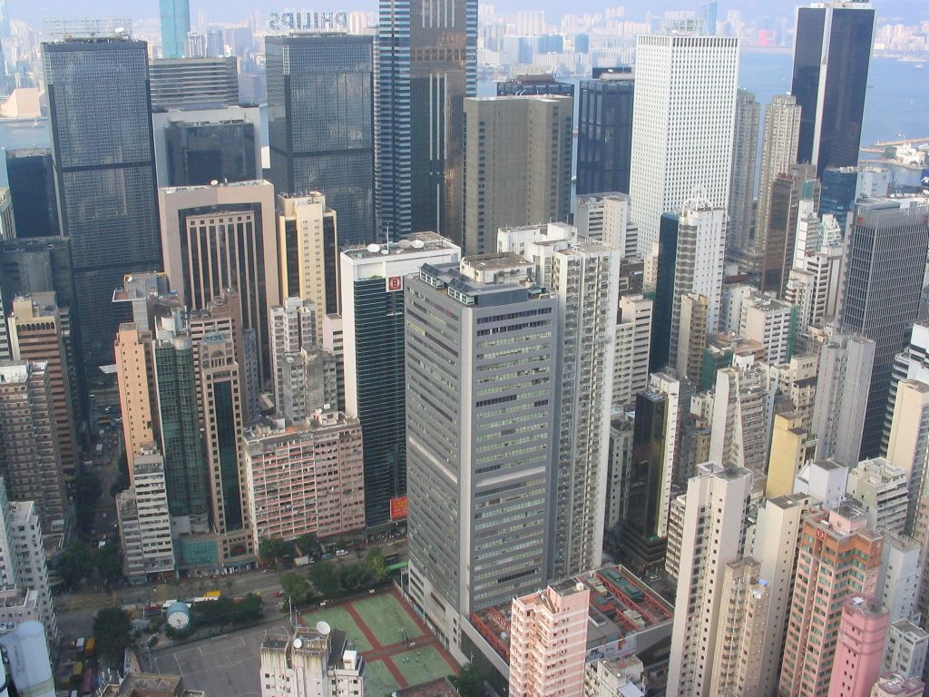 灣仔 Wanchai